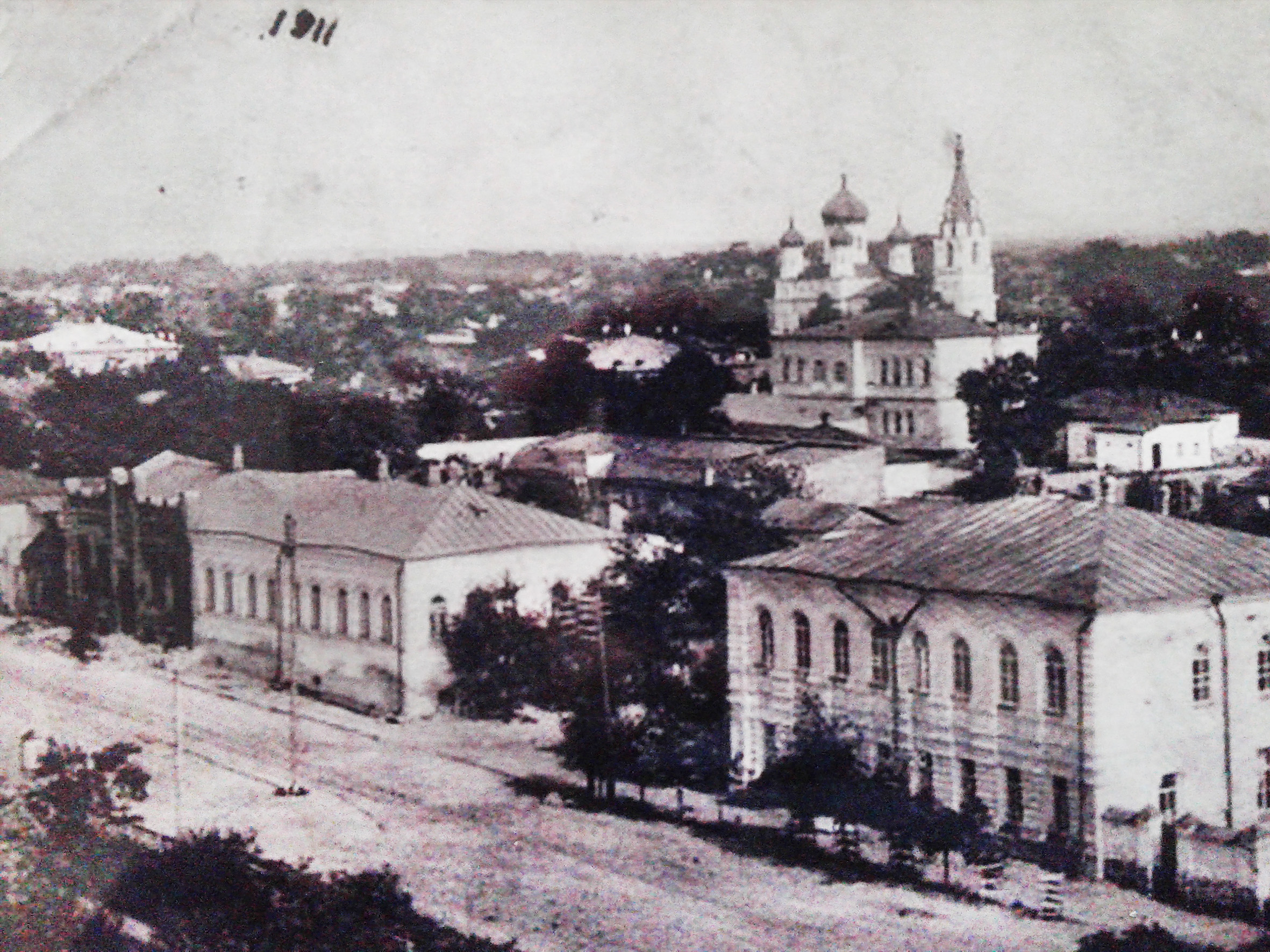 Старобільськ. Справа - будівля земської управи, далі - Миколаївська церква